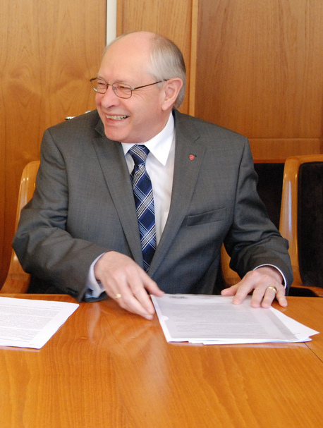 Martin Kolberg